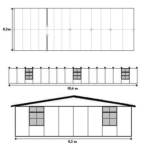 Skizze einer Wehrmachtsbaracke